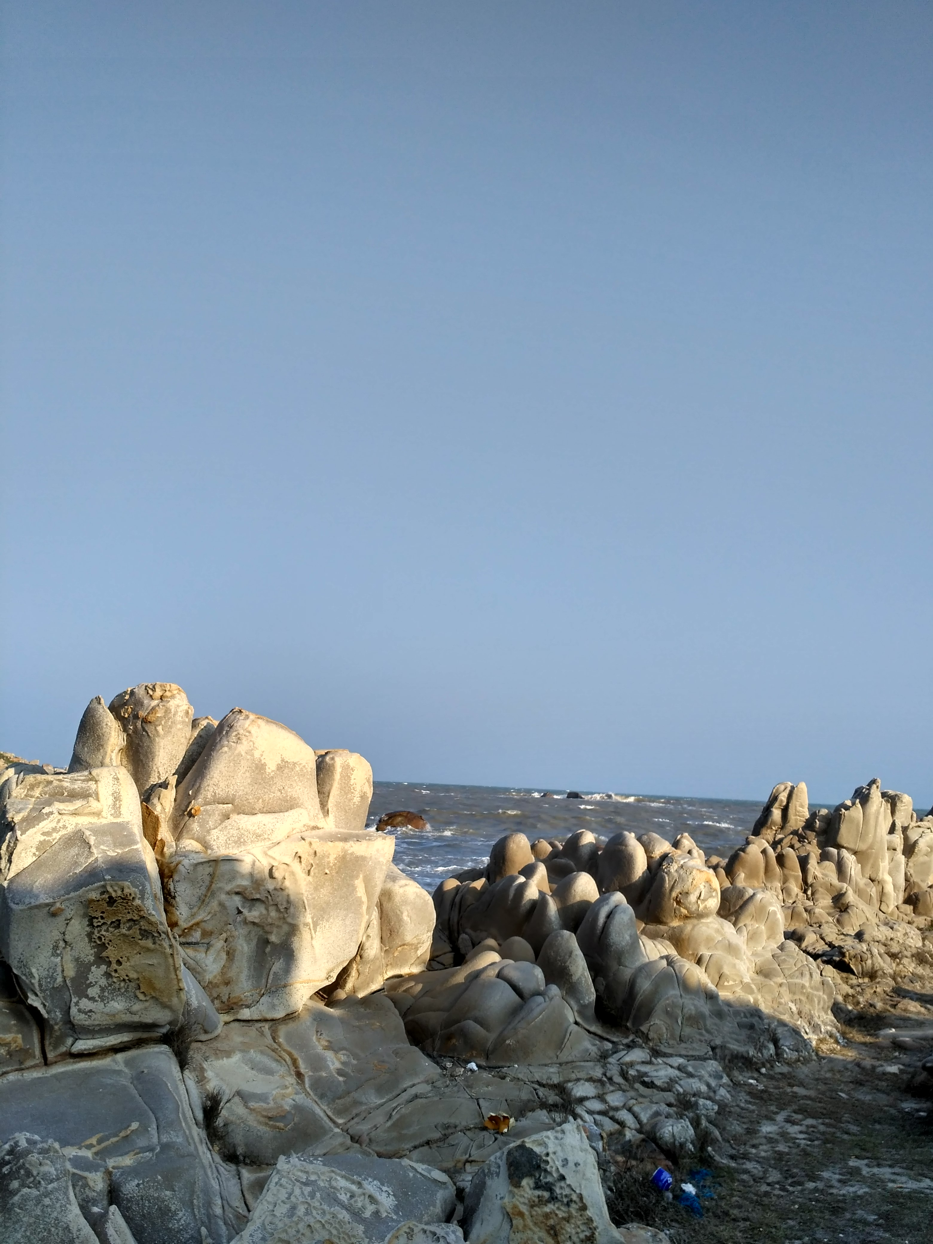 中文（台灣）: 客鳥尾，中國廣東省汕頭市惠来县靖海镇